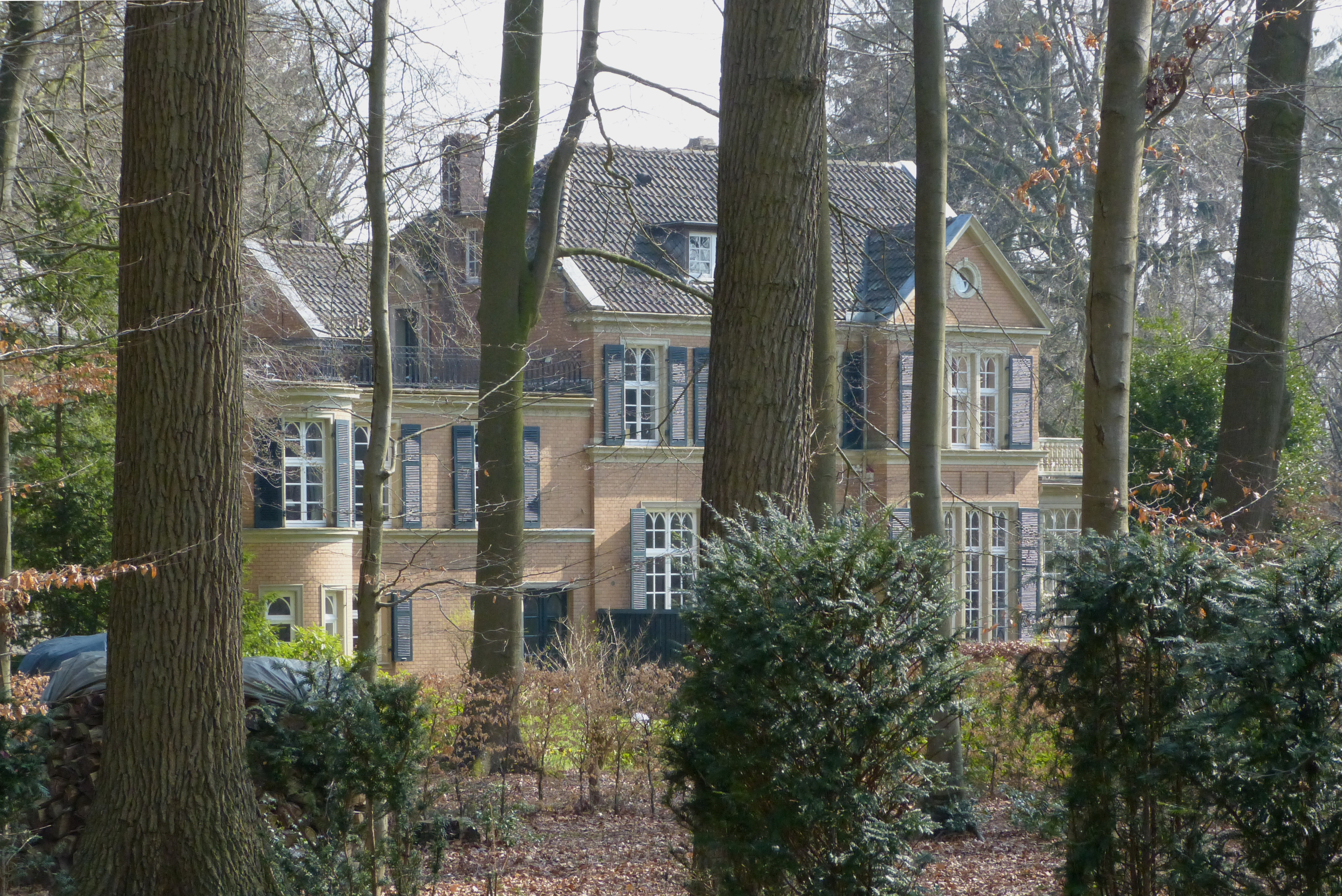 Landhaus Lamotte, Ökologiestation in Bremen, Am Gütpohl 9Das abgebildete Objekt ist ein geschütztes Kulturdenkmal in der Freien Hansestadt Bremen, mit der Nr. 1653 beim Landesamt für Denkmalpflege registriert.